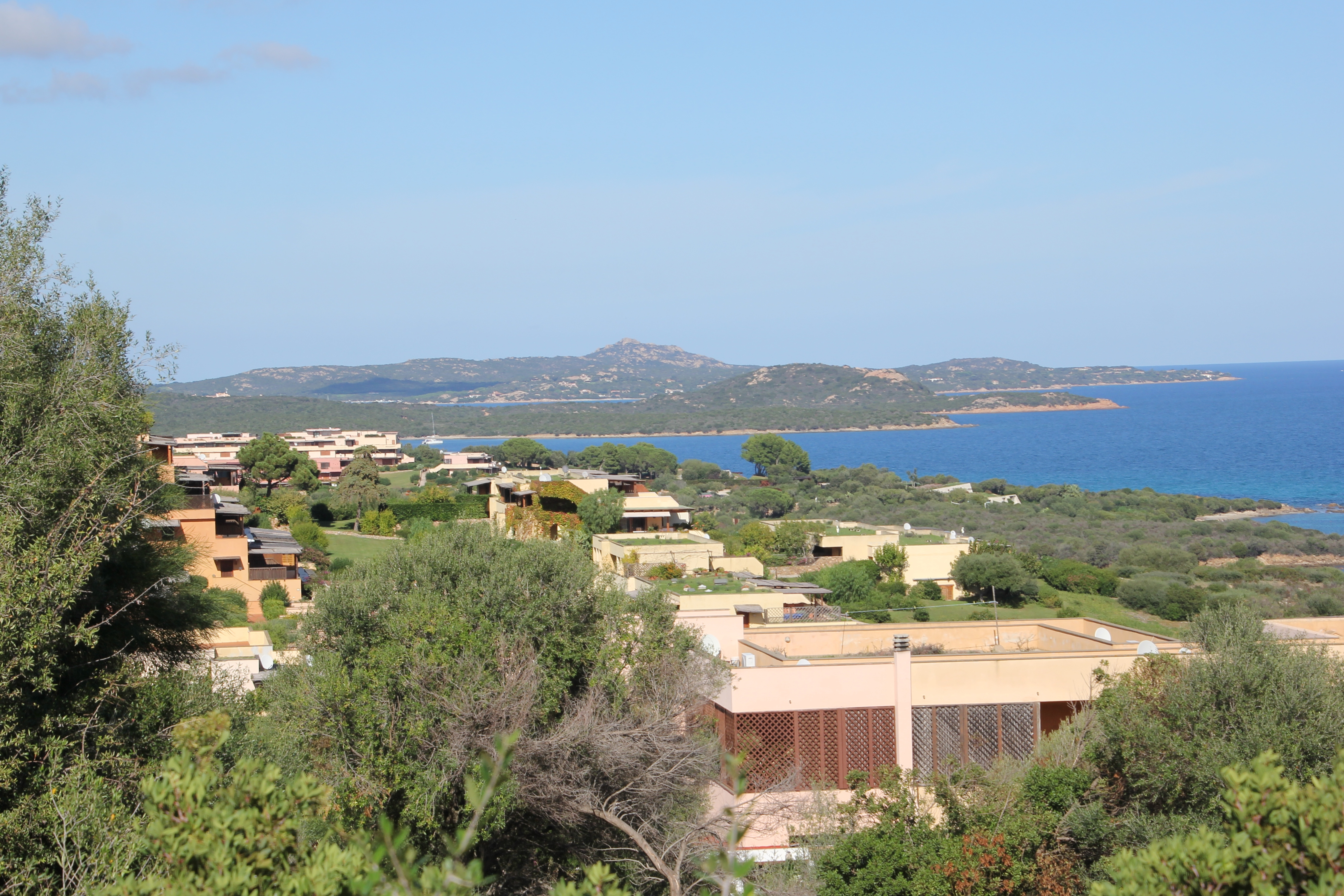 Olbia, frazione Portisco